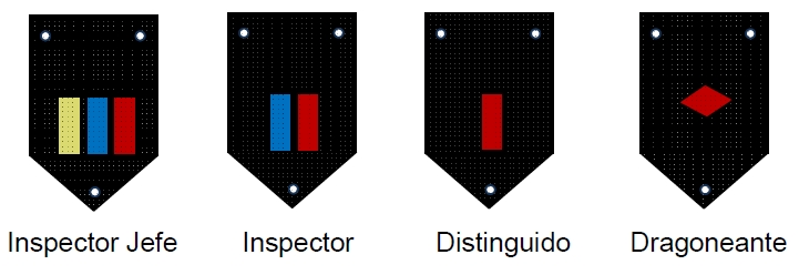 Jinetas para el personal de sub-oficiales y dragoneantes en uniforme de gala del cuerpo de custodia y vigilancia nacional del INPEC